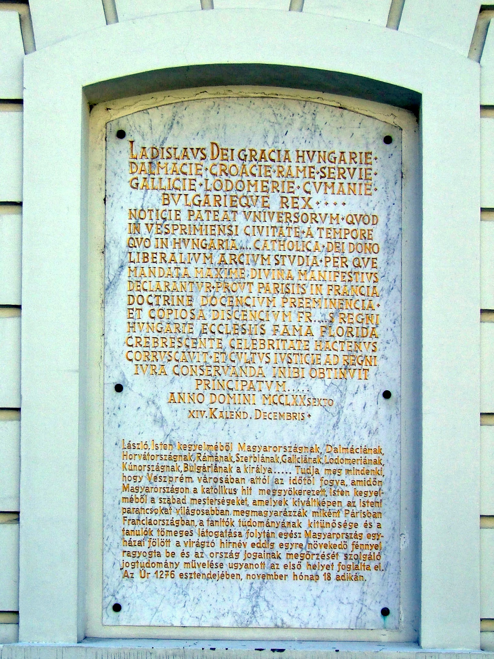 Emléktábla a veszprémi várban IV. László 1276-es adománylevelének soraival. (az adományozás előtt Csák Péter nádor elfoglalta és kifosztotta Kőszegi Péter veszprémi püspök székhelyét)